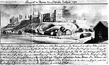 No no Broces kolekcijas